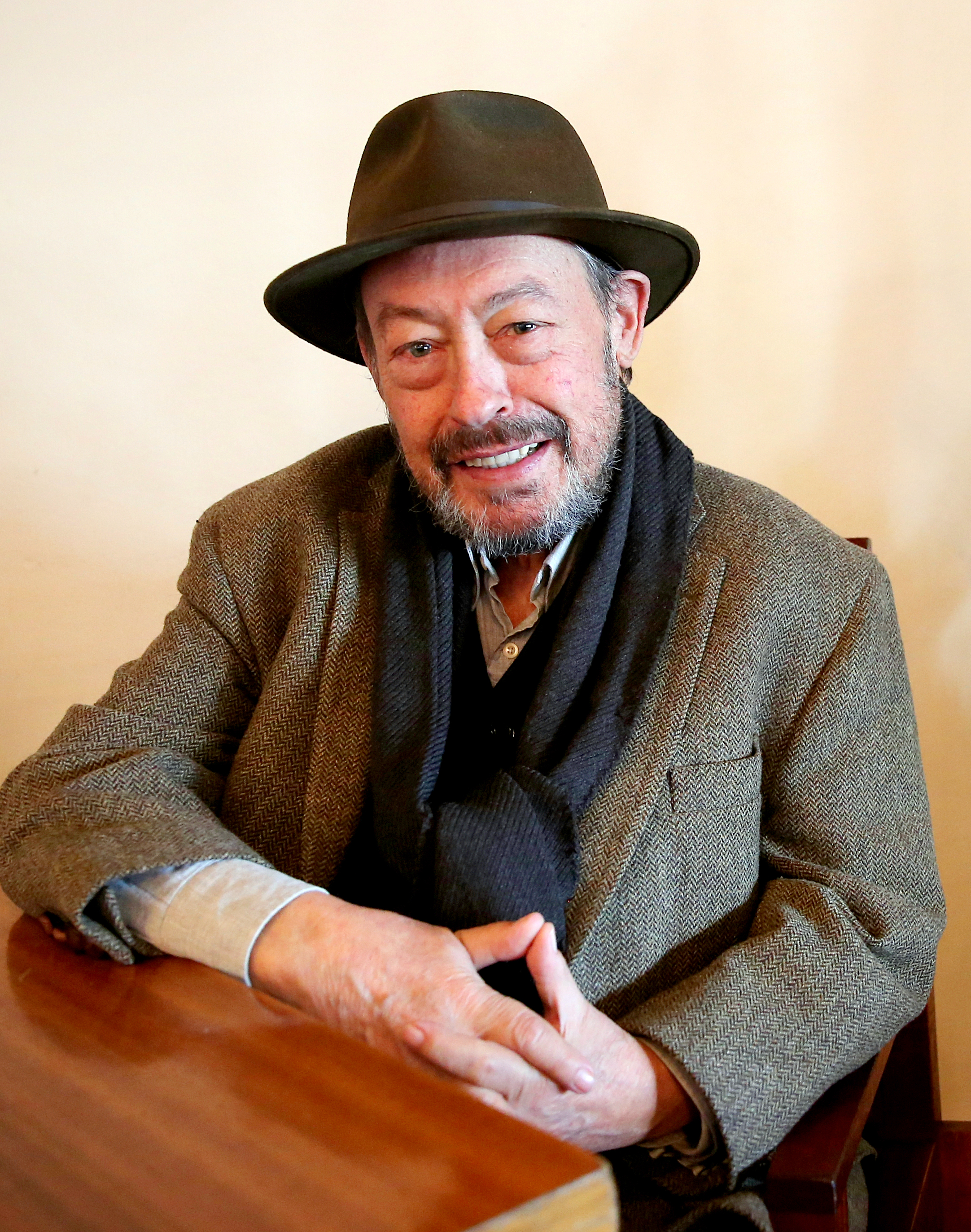 El periodista y escritor Gregorio Morán.